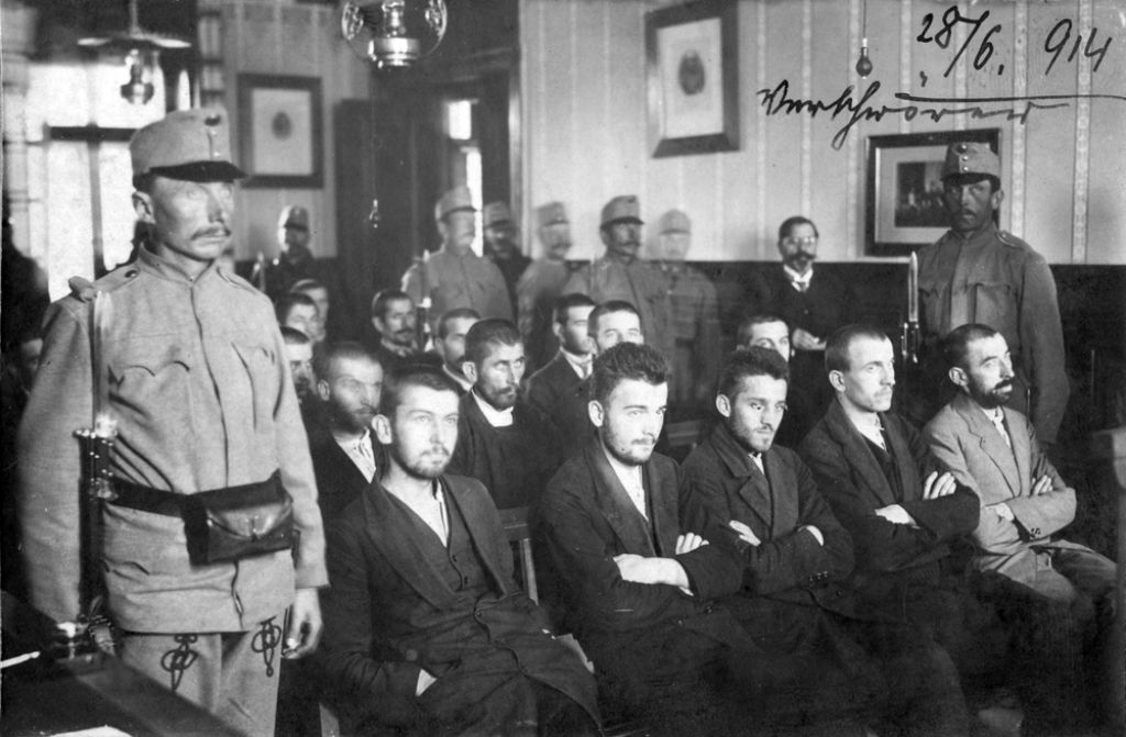 Sarajevo trial, 1914.